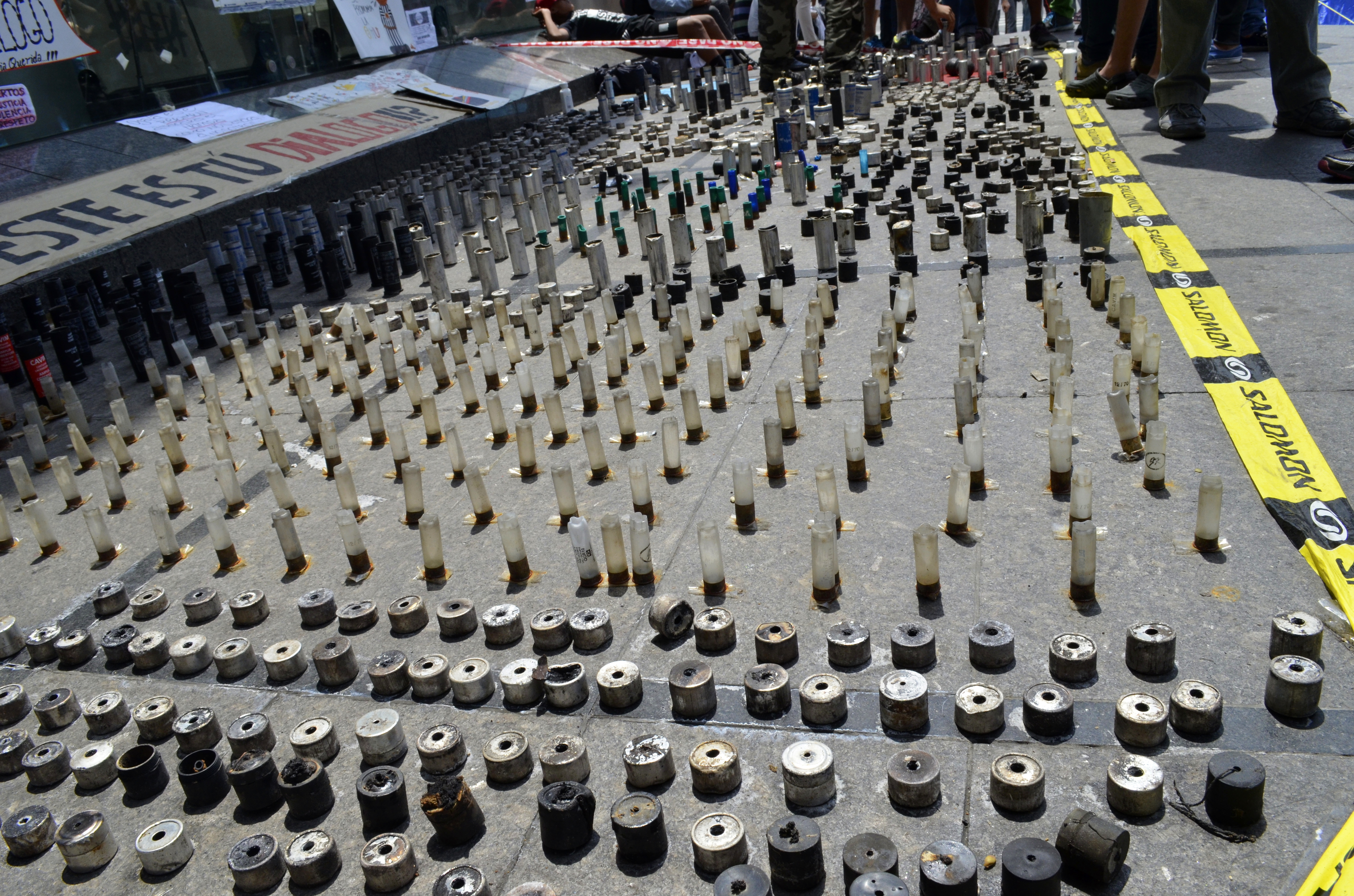 Instrumentos de paz en Campamento PNUD, 05Abr14